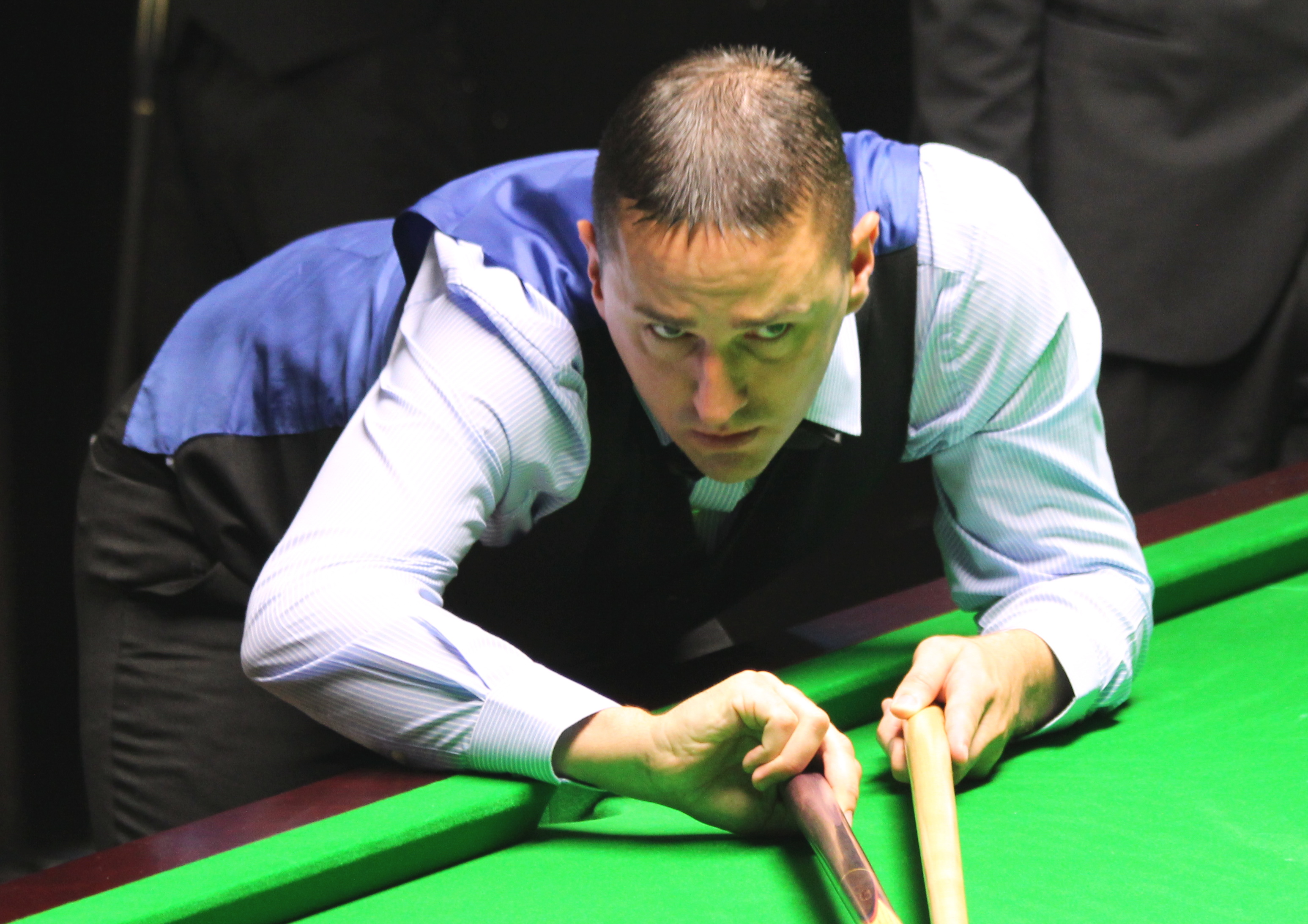 David John beim Paul Hunter Classic 2016